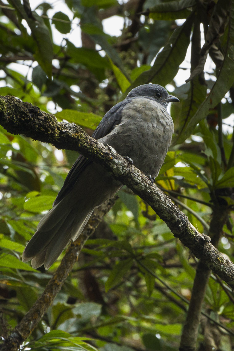 Dusky Piha - Colombia_S4E2023